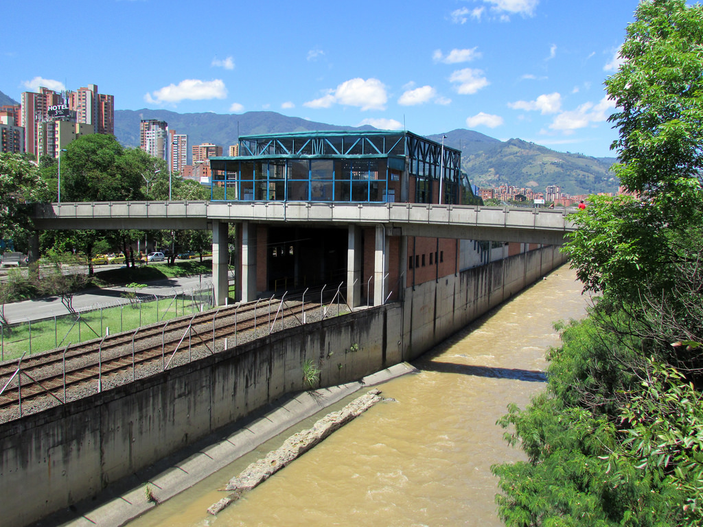 Estación Aguacatala (Metro de Medellín)